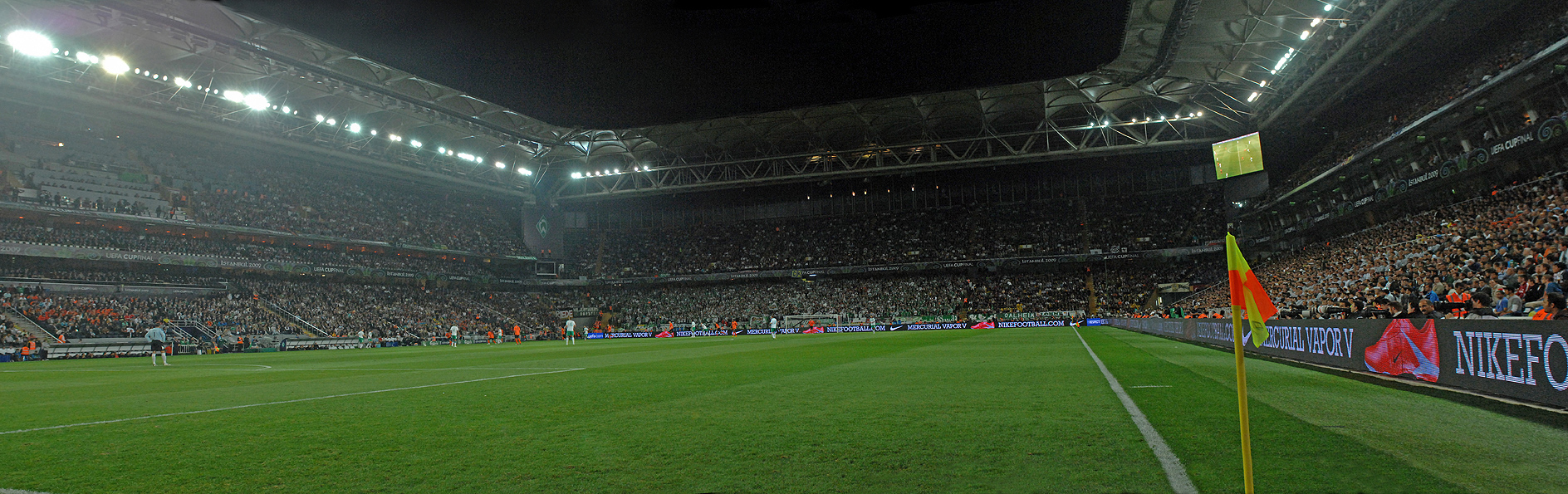 ŞÜKRÜ SARACOĞLU STADIUM